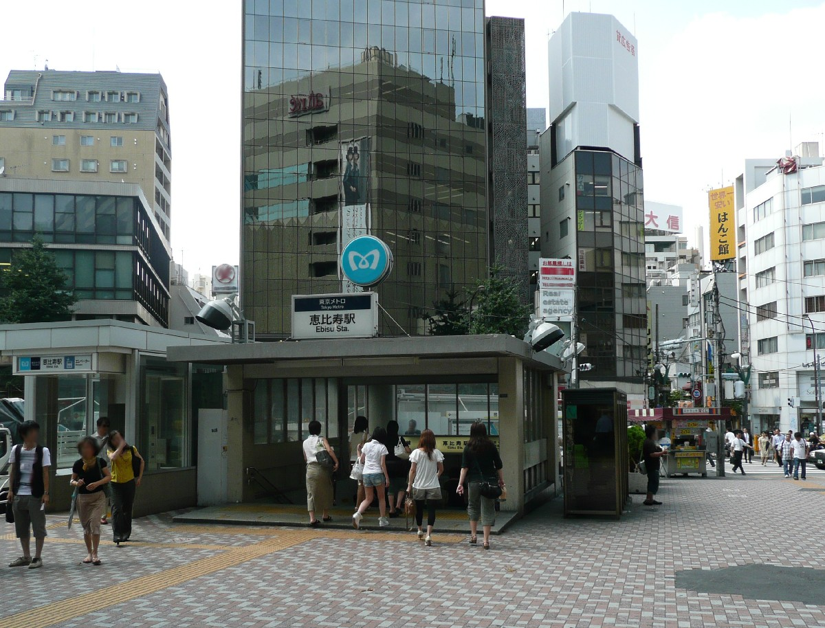 東京地下鉄ja:恵比寿駅1番出入口